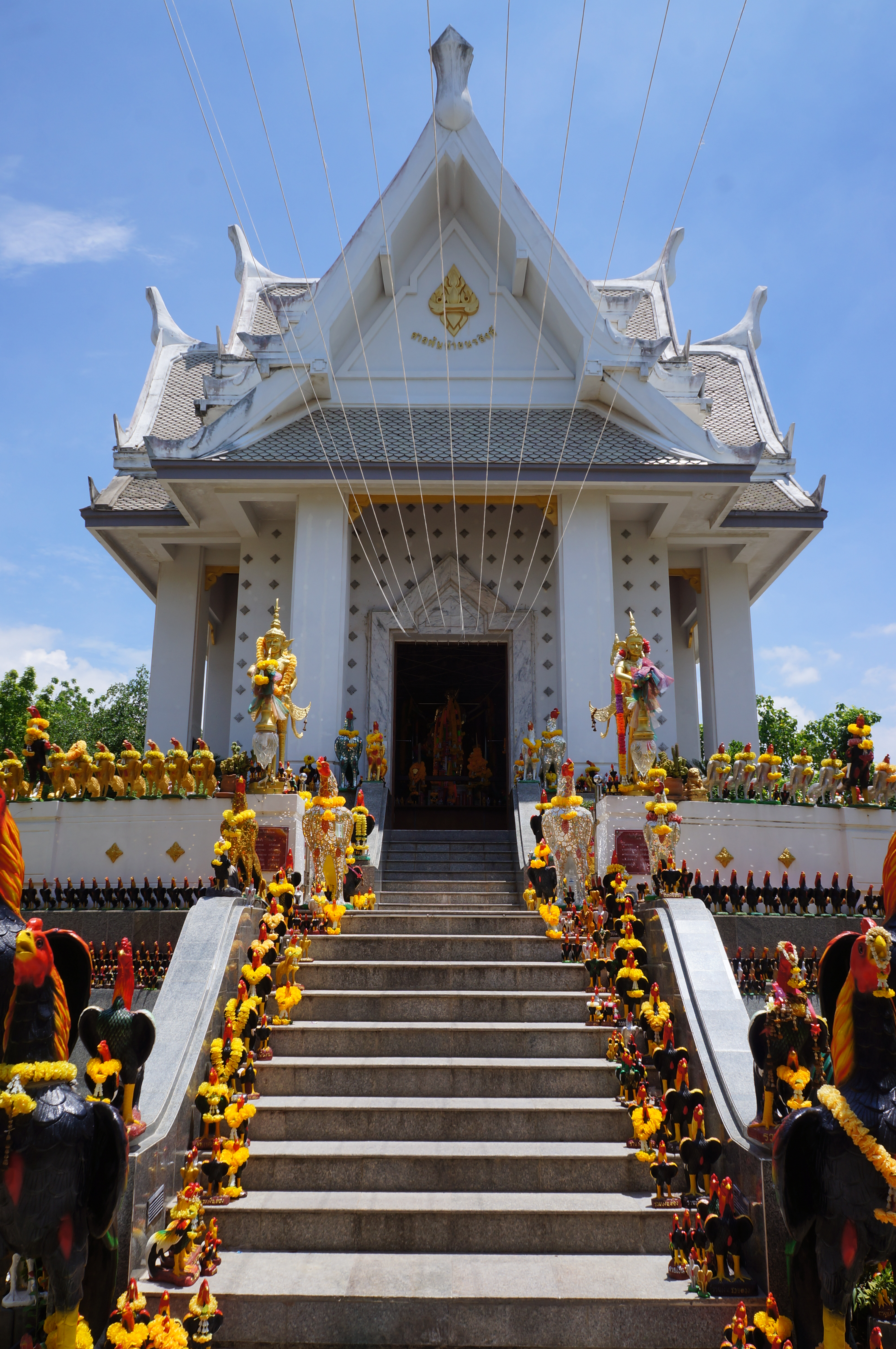 ศาลพันท้ายนรสิงห์ เป็นอนุสาวรีย์แห่งความซื่อสัตย์ รักษากฎระเบียบ กฎมณเฑียรบาลยิ่งกว่าชีวิตตน ตั้งอยู่ที่บ้านพันท้ายนรสิงห์ ตำบลพันท้ายนรสิงห์ อำเภอเมืองสมุทรสาคร จังหวัดสมุทรสาคร ศาลพันท้ายนรสิงห์ถูกประกาศขึ้นทะเบียนเป็นโบราณสถานของชาติ ในราชกิจจานุเบกษา เล่ม 72 ตอนที่ 2 เมื่อวันที่ 4 มกราคม พ.ศ. 2498 กรมศิลปากรได้ดำเนินการจัดสร้างศาลพันท้ายนรสิงห์ขึ้น อยู่ถัดจากศาลเก่าที่พังลงมาไม่มากนัก โดยกันอาณาบริเวณรอบ ๆ ศาลไว้ประมาณ 100 ไร่ เพื่อจัดตั้งเป็น "อุทยานพันท้ายนรสิงห์" ภายในศาลมีรูปปั้นของพันท้ายนรสิงห์ขนาดเท่าของจริงในท่าถือท้ายคัดเรือ